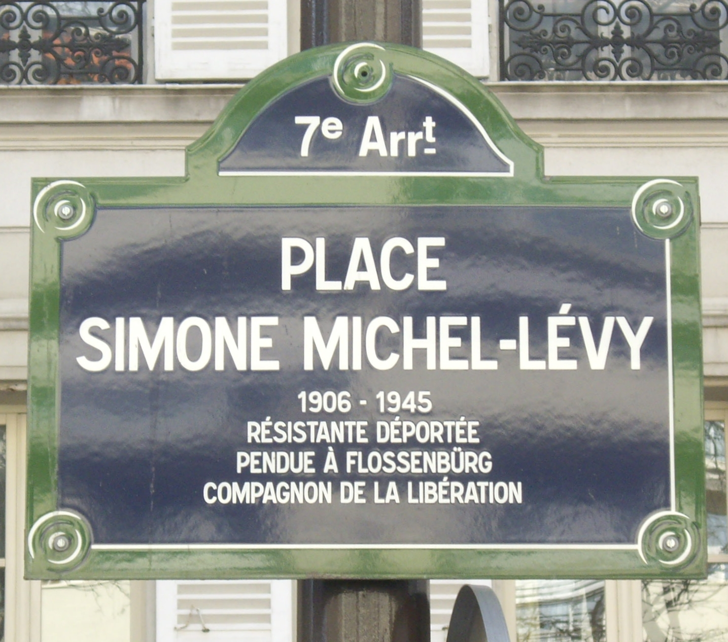 Place Simone-Michel-Lévy, Paris 7e. « Simone Michel-Lévy, 1906-1945, résistante déportée, pendue à Flossenbürg, compagnon de la Libération. »